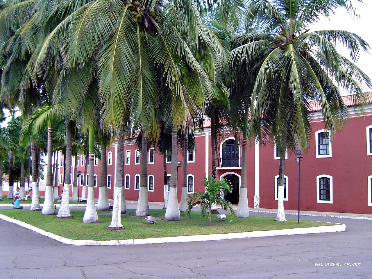 O Convento das Mercês,situado na Praia Grande, é uma grandiosa obra da arquitetura religiosa mercedária inaugurada em 1654 pelo Padre Antônio Vieira. O Convento abriga a Fundação da Memória Republicana, o Memorial José Sarney, o Centro Modelador de Pesquisa da História Republicana e o Instituto da Amizade dos Povos de Língua Portuguesa.